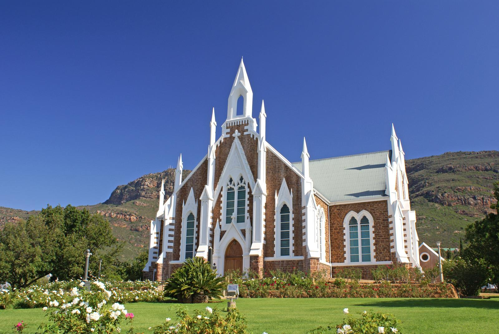 Church in Piketberg